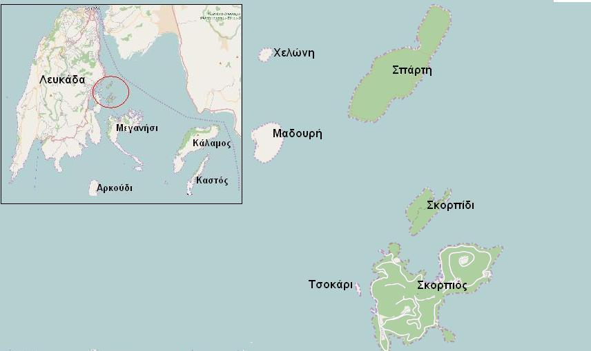 Πριγκηπονήσια Λευκάδας